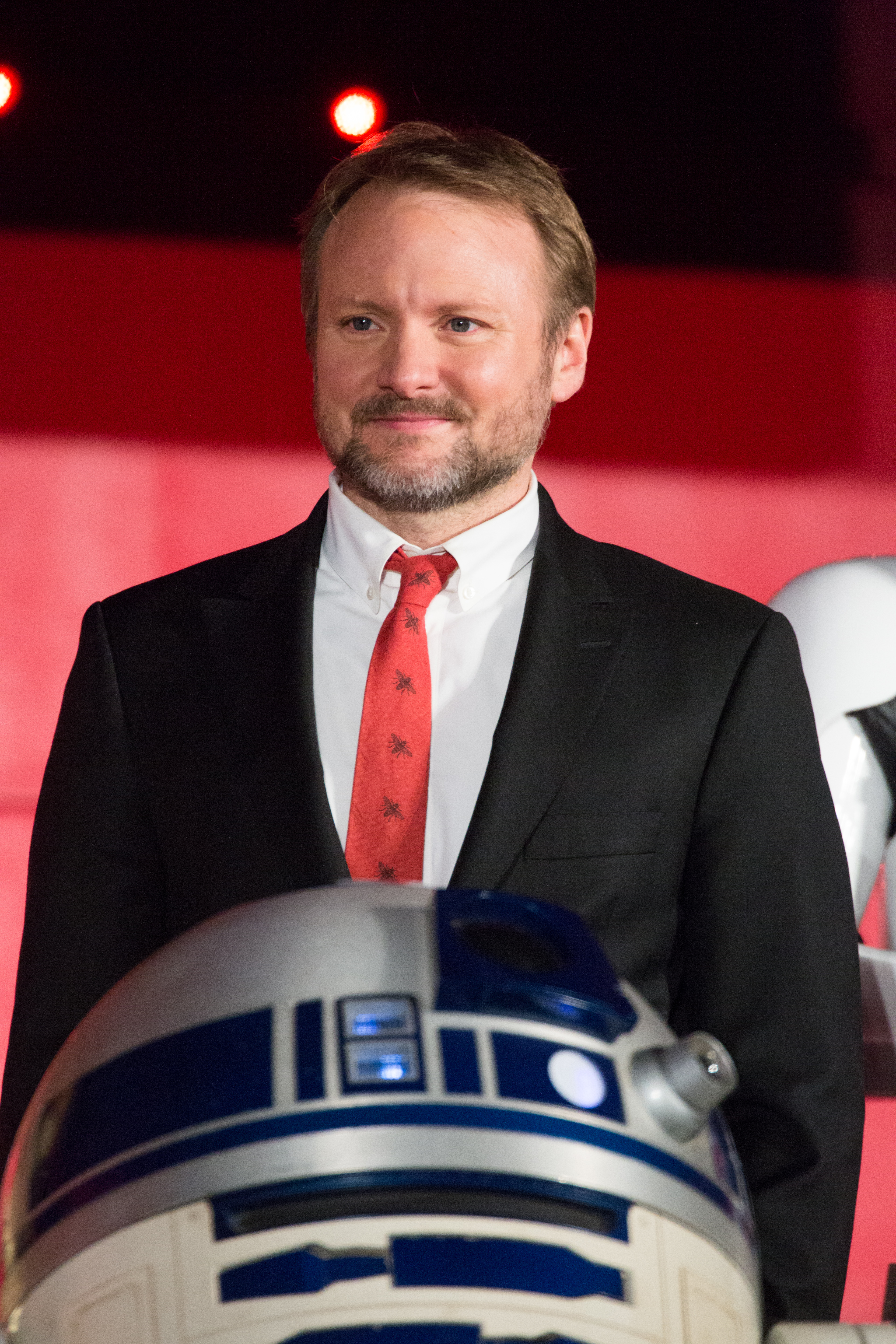 スター・ウォーズ/最後のジェダイ ジャパン・プレミア レッドカーペット ライアン・ジョンソン